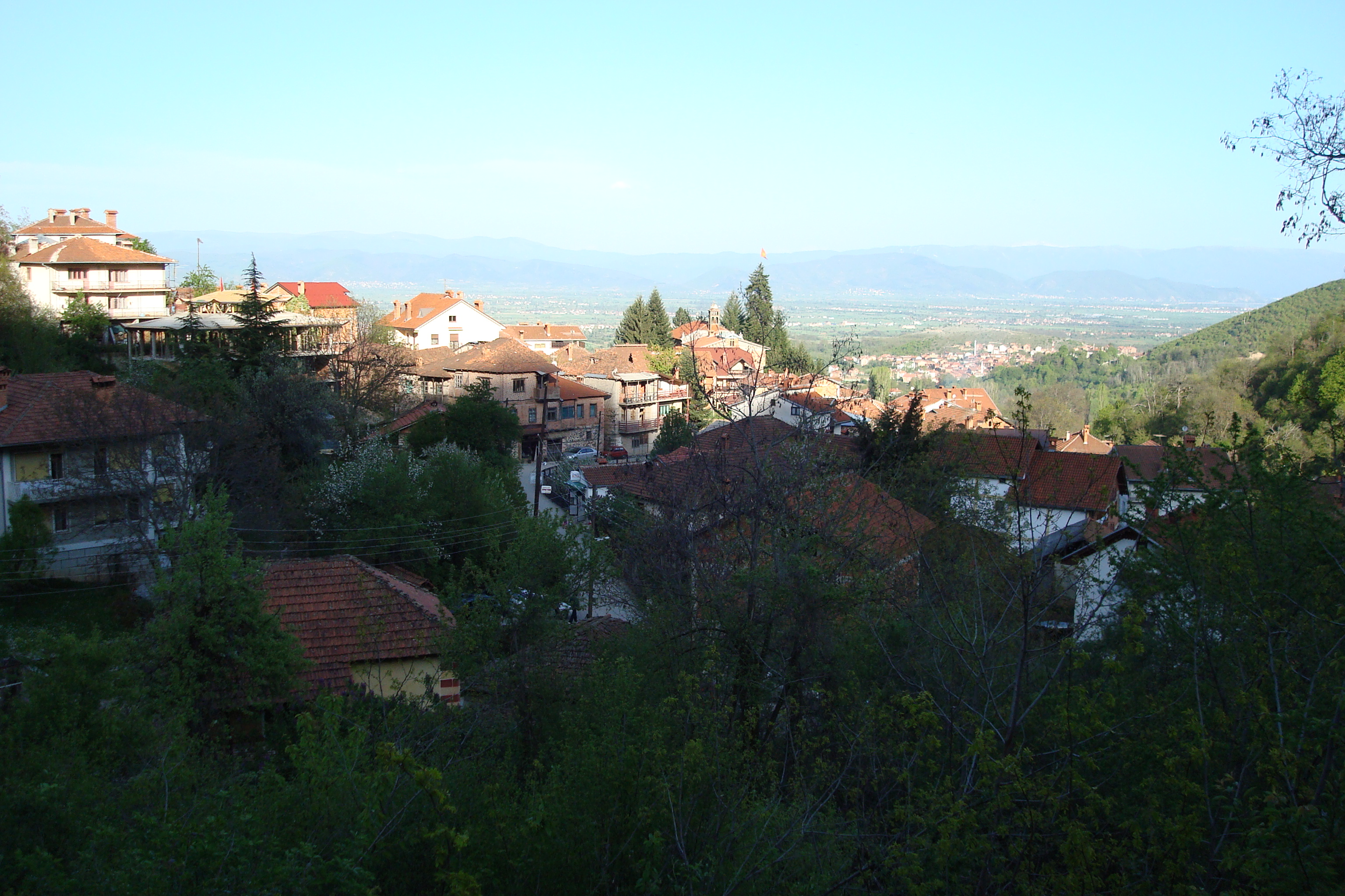 Панорама на Вевчани, Република Македония.